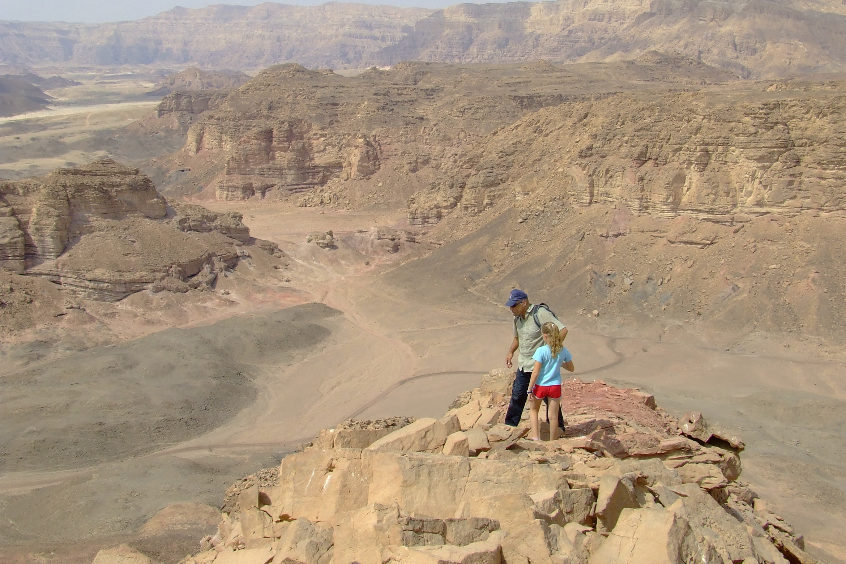 מבט על עמק ססגון והר מכרות מראש גבעת ססגון